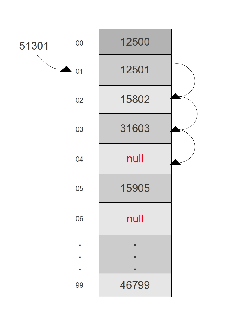 Illustrerar hur linjär sondering kan gå till i en hashtabell